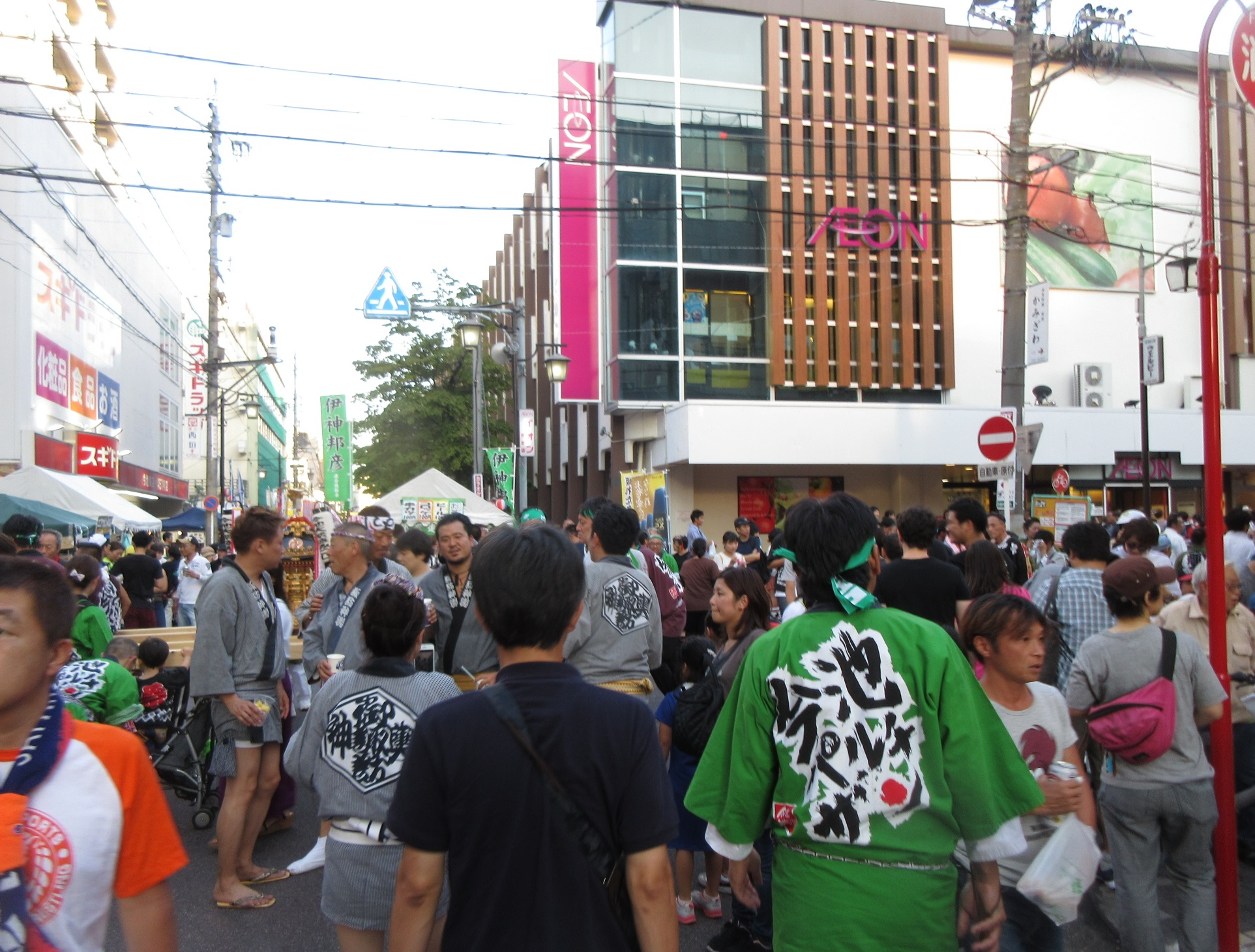 1989年から毎年秋に開催されている「今池まつり」